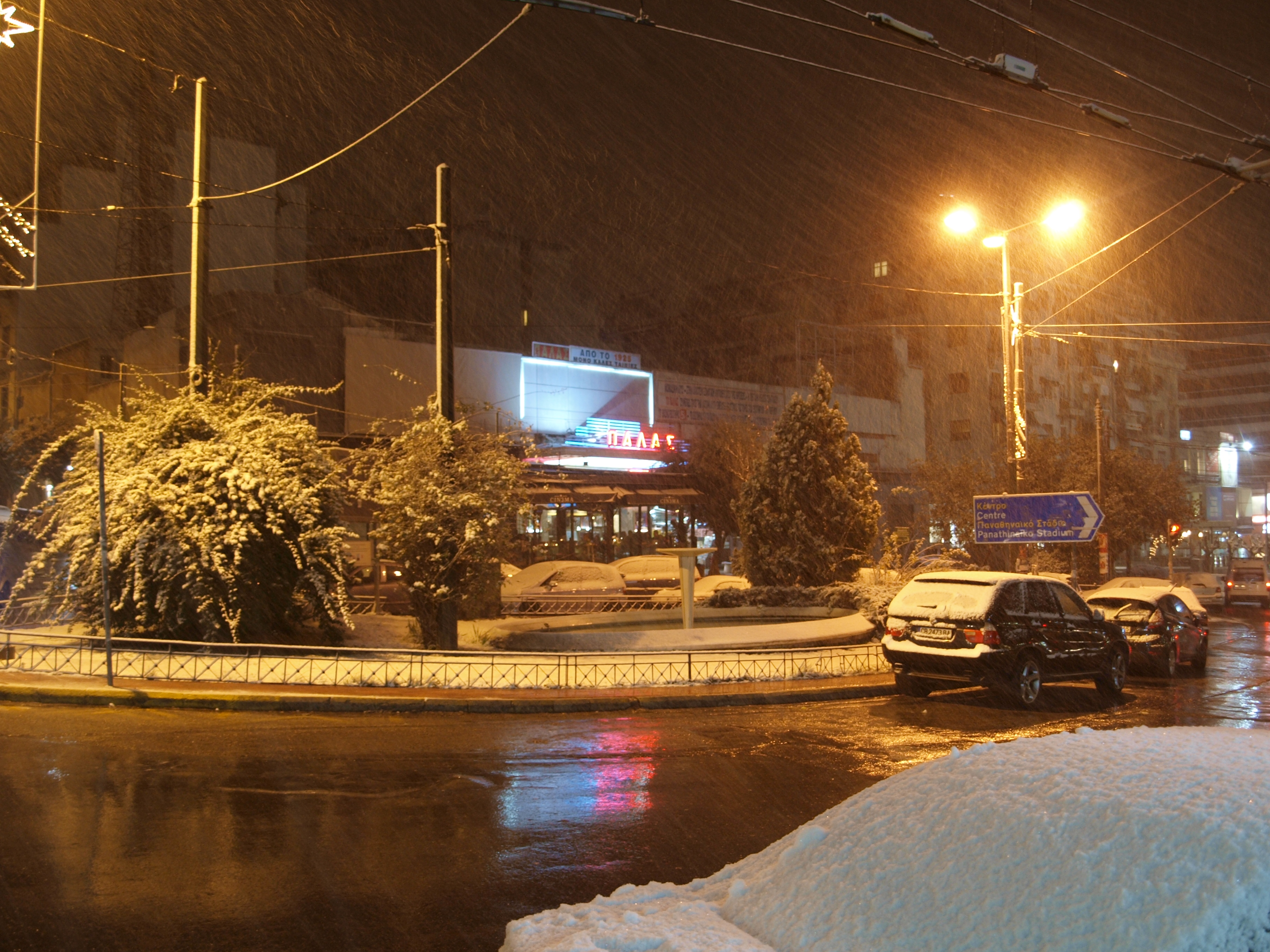 Ο κινηματογράφος ΠΑΛΑΣ στο Παγκράτι, ο παλαιότερος σε λειτουργία κινηματογράφος της Αθήνας